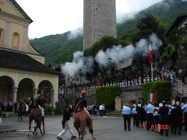 Immagini Milizia Tradizionale di Calasca Panoramica dopo salve d'onore foto personale Agosto 2006